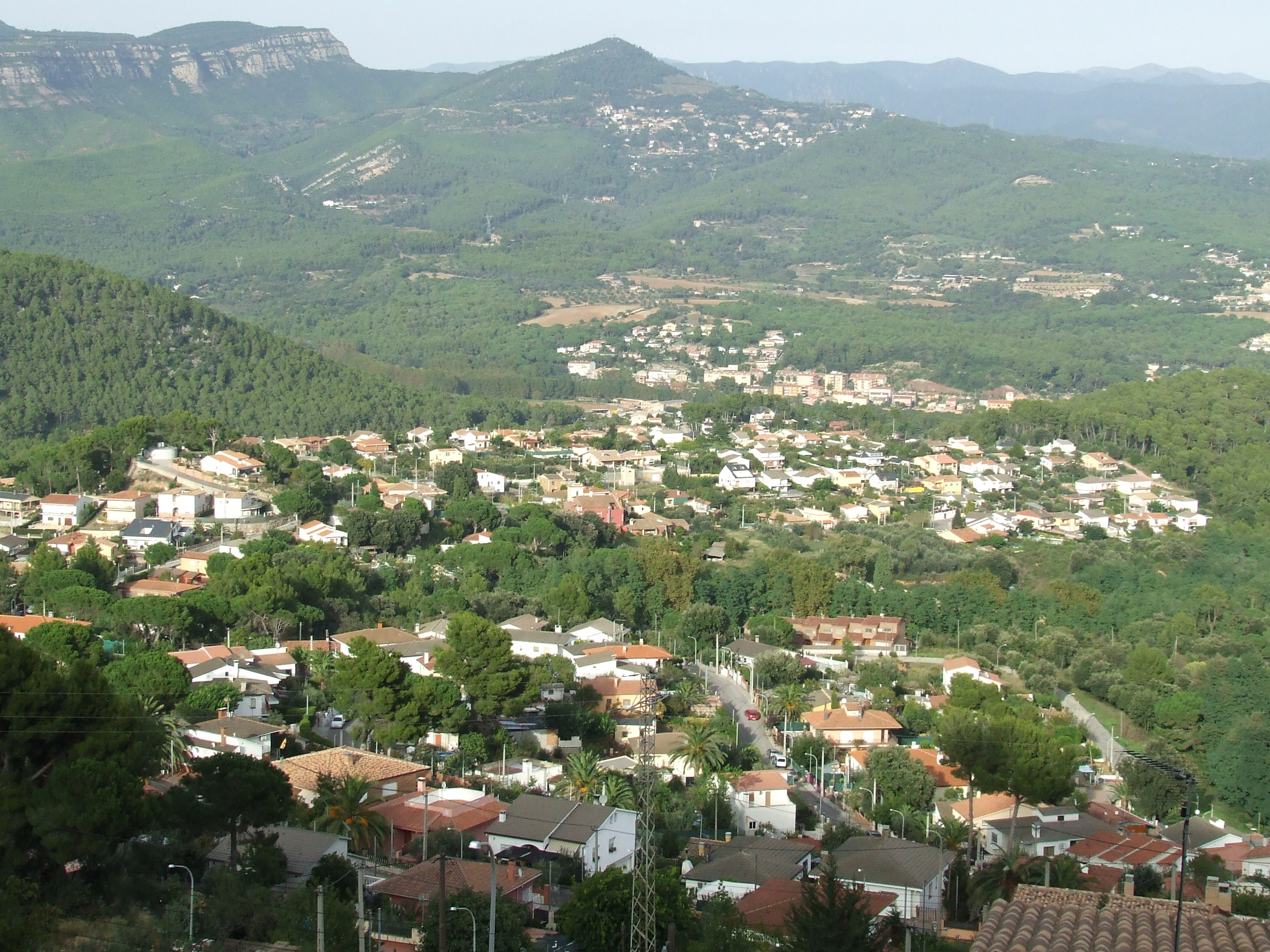 Urbanitzacions de la Pineda de Montbui i de Can Carreres (Bigues, Bigues i Riells, Vallès Oriental)